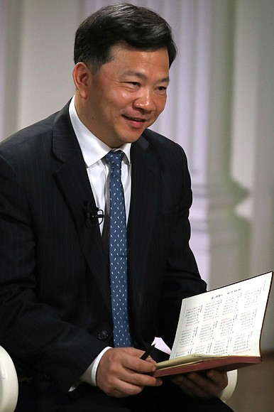 中央广播电视总台台长慎海雄